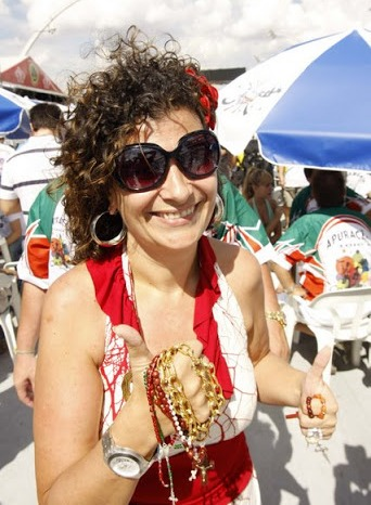 Carnaval São Paulo 2010. Movimentação antes da apuração das escolas de samba do Grupo Especial, hoje, no sambódromo do Anhembi em São Paulo, SP. Na Foto: O presidente da Mocidade Alegre, Solange Bichara. Fotógrafo: Léo Pinheiro